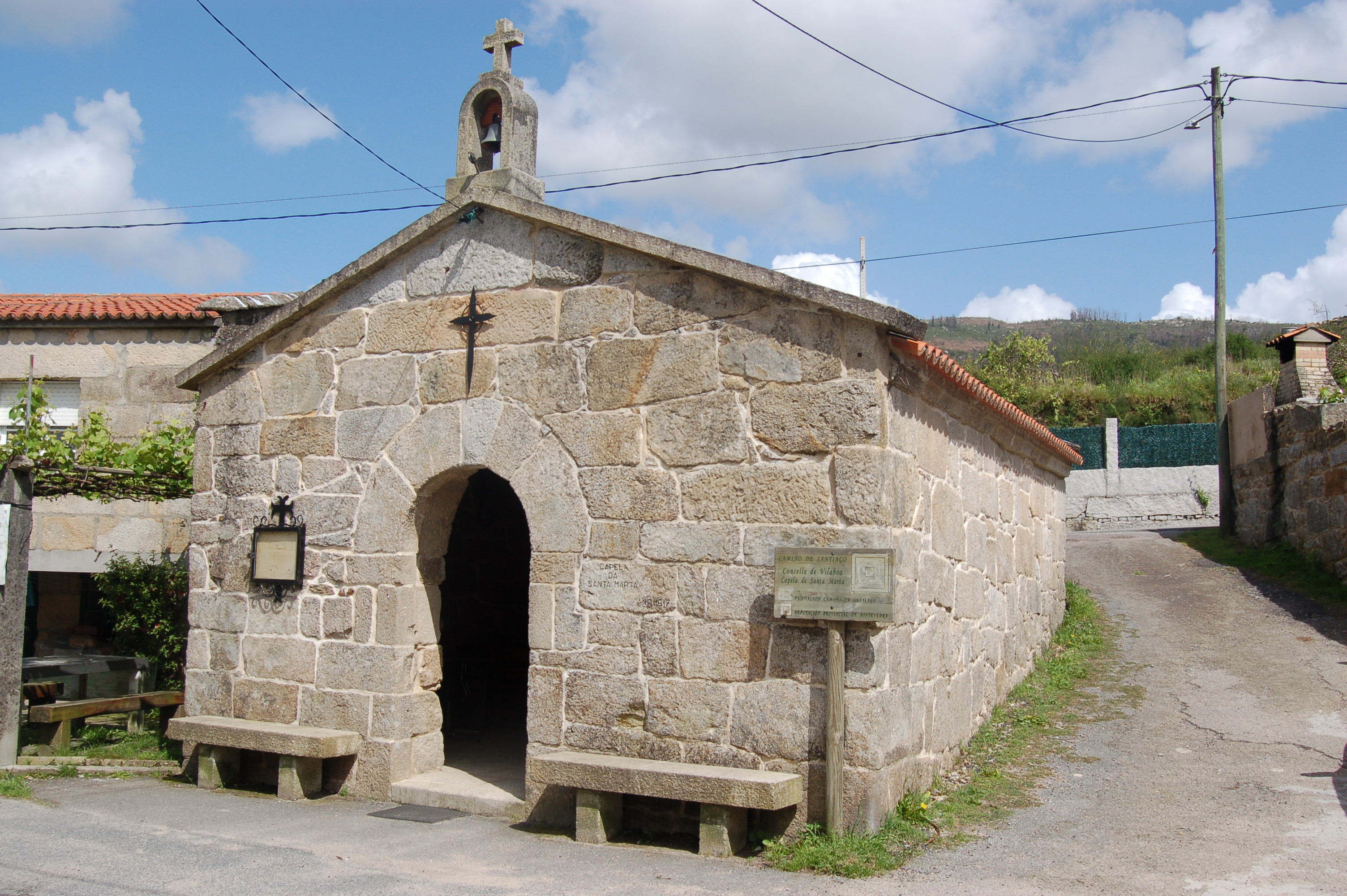 Capela de Santa Marta, en Santa Comba de Bértola (Vilaboa), a carón do camiño portugués